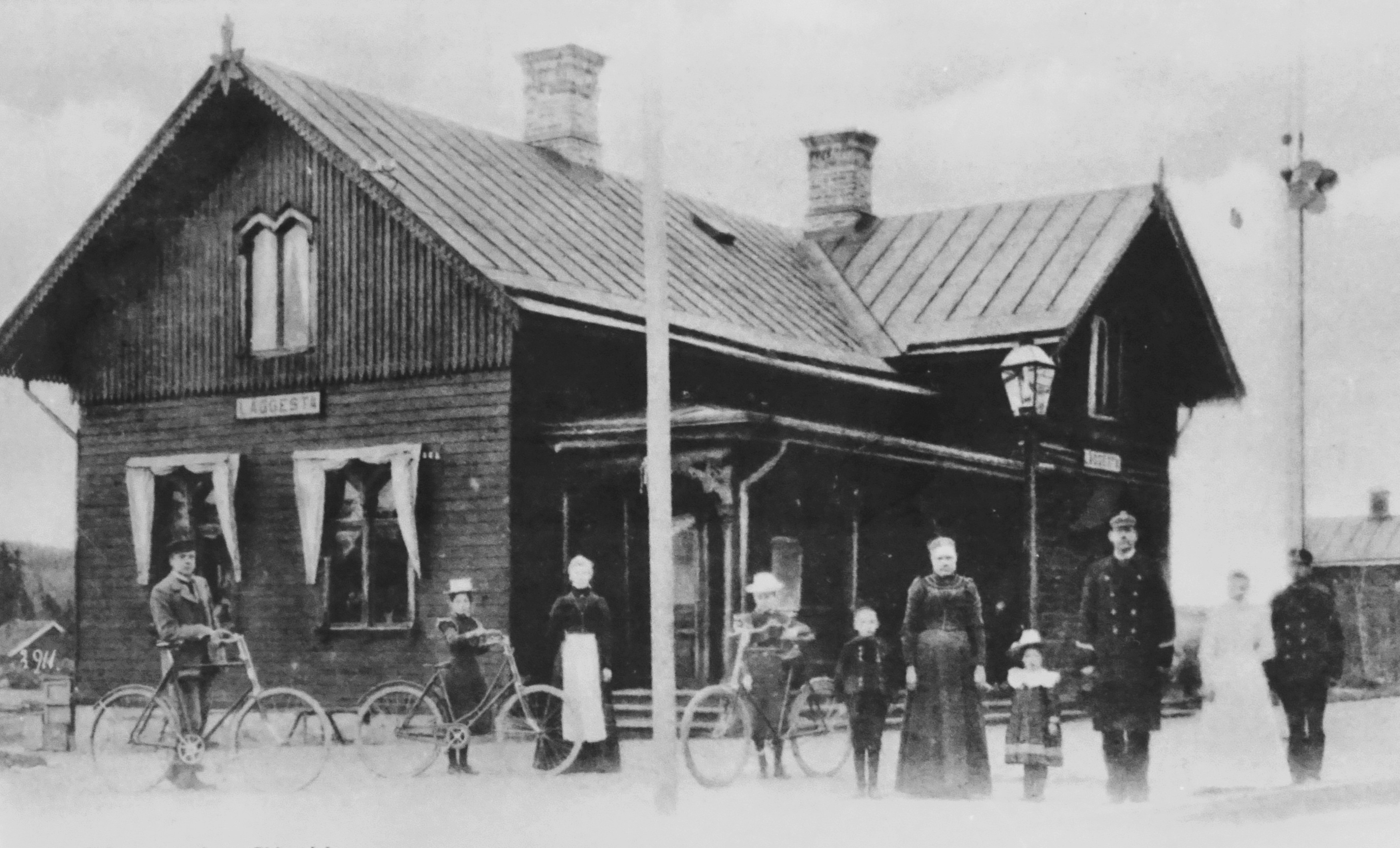 Stationshuset Läggesta med sinsfamiljen Björk och banvakt.